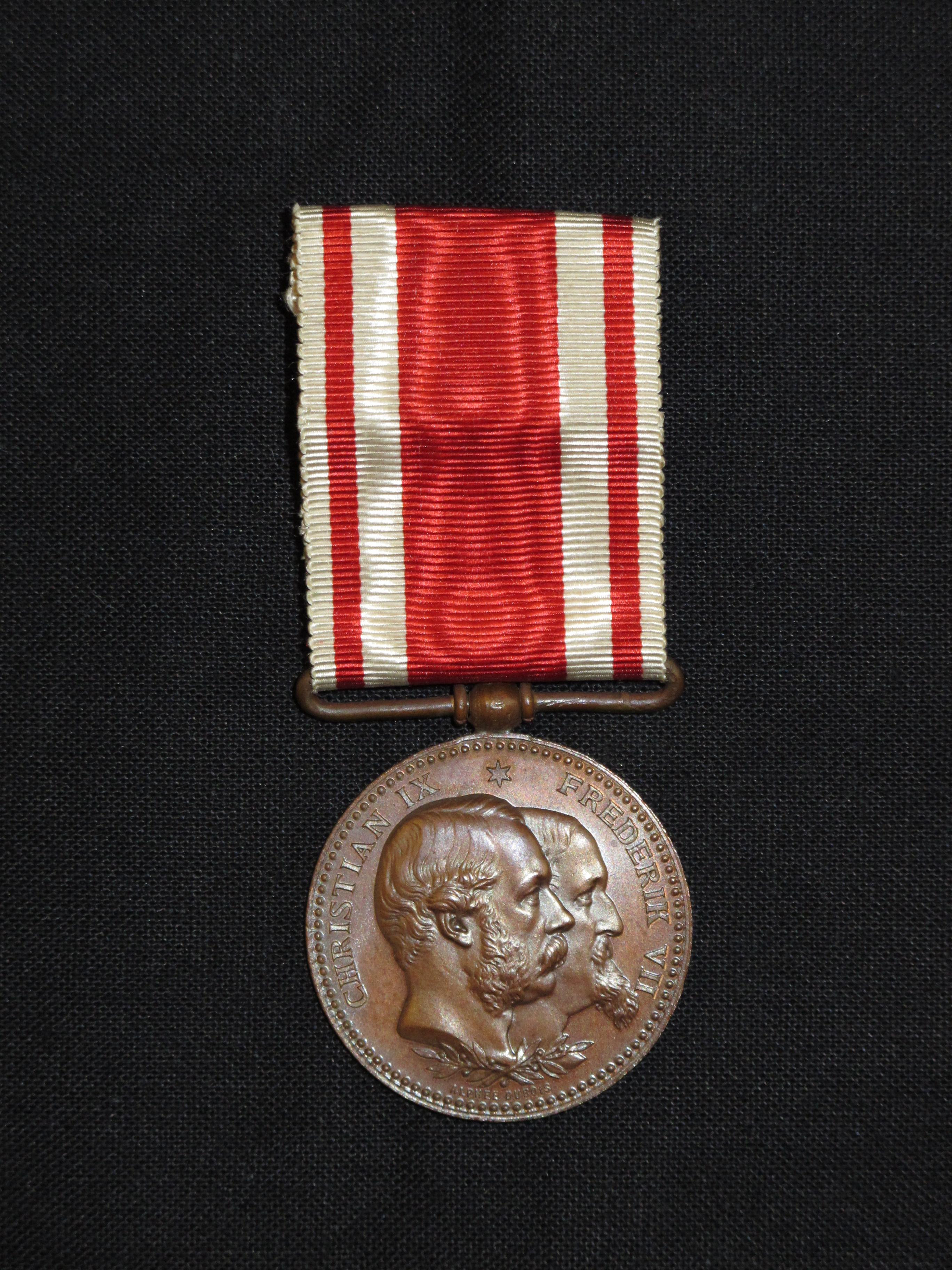 Erindringsmedalje for krigsdeltagelse i krigen 1848-50 og 1864.